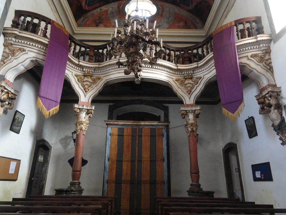 Igreja de Nossa Senhora do Carmo. Coro de Aleijadinho.